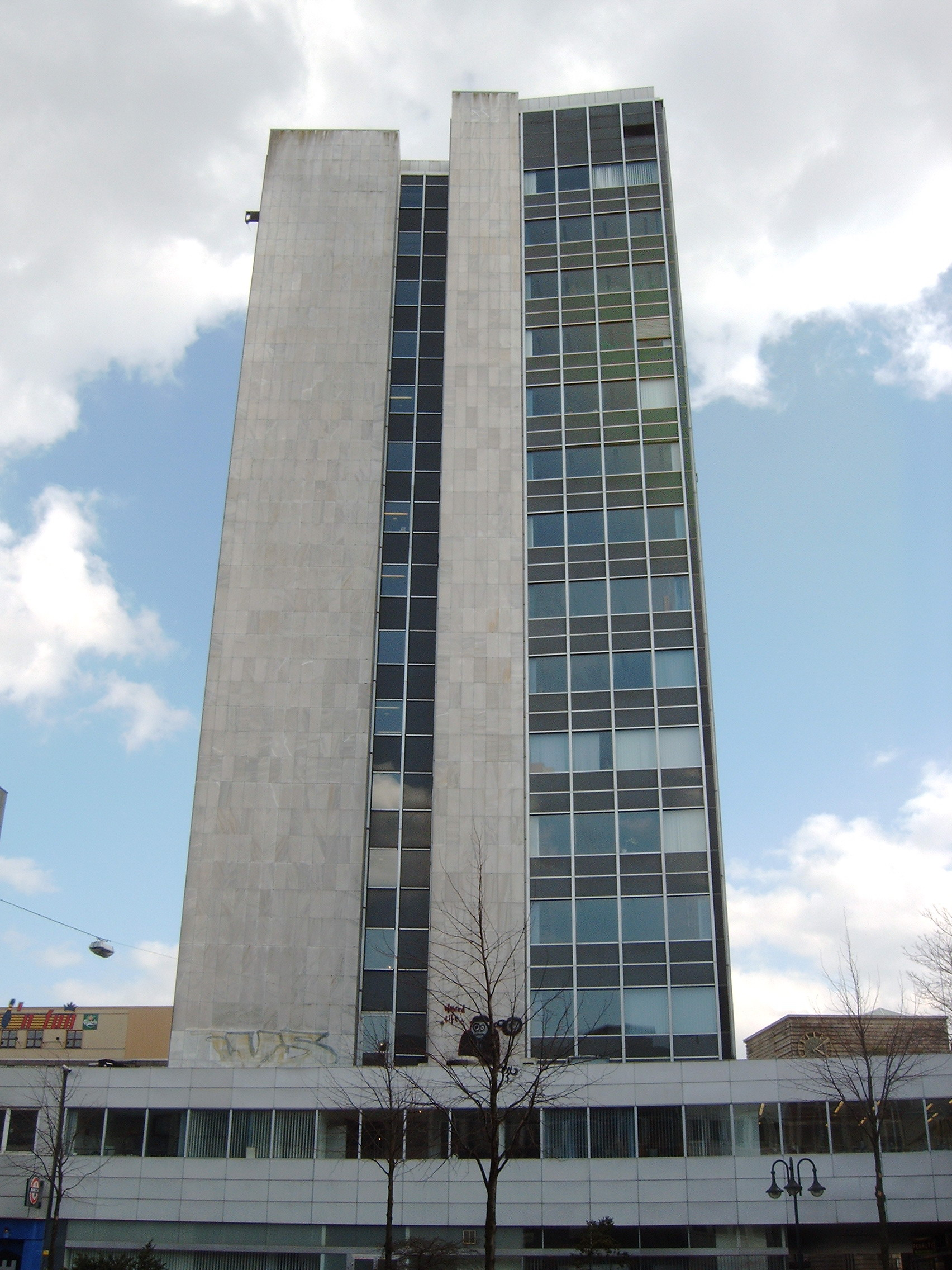 Herdentor str. Bremen, Germany Down town